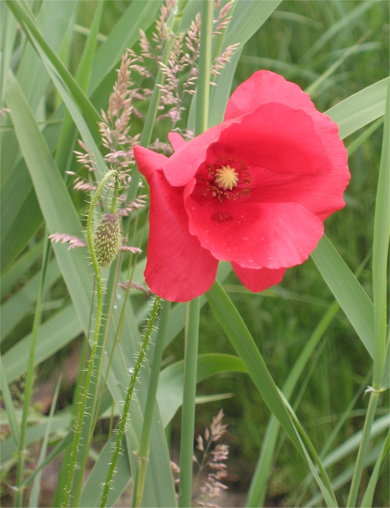 Gewone klaproos bloem Papaver rhoeas